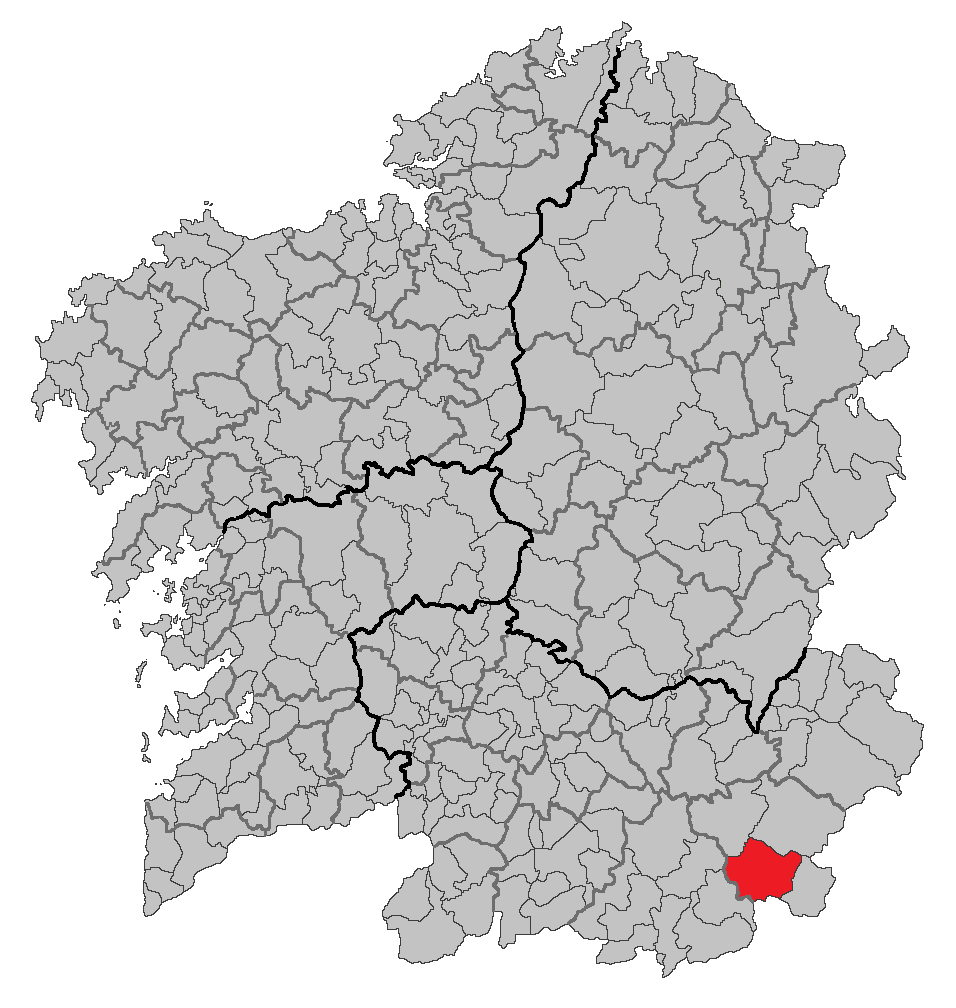 Mapa coa localización do concello de A Gudiña.